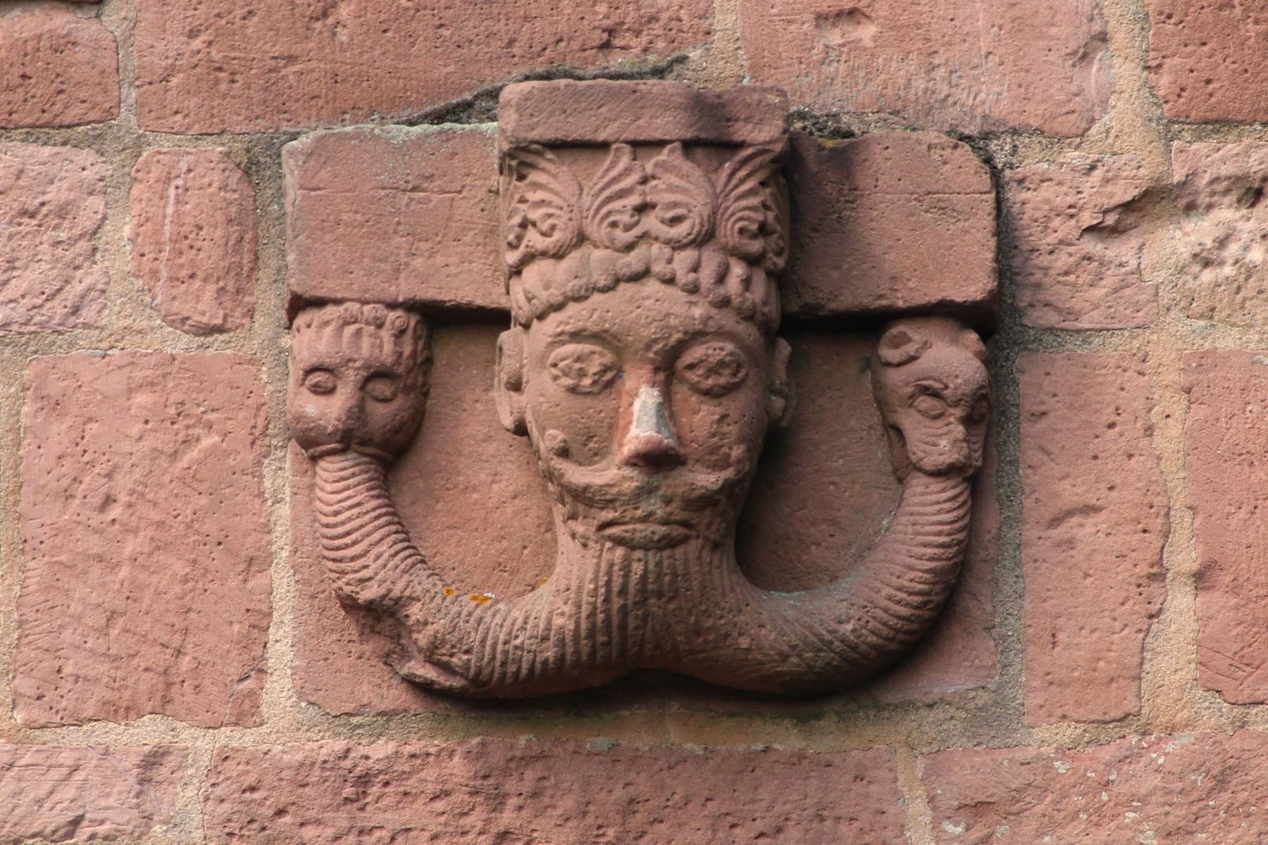 Kaiserpfalz Gelnhausen Detail